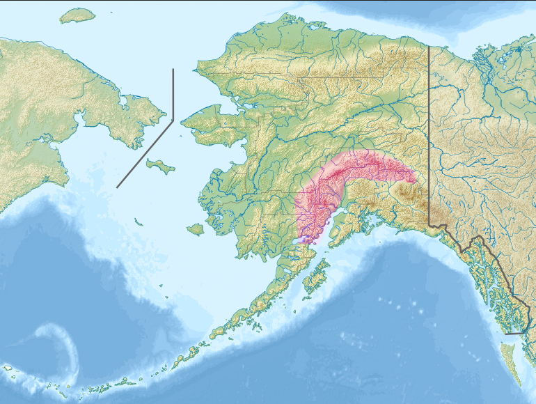 La chaîne d'Alaska en rose